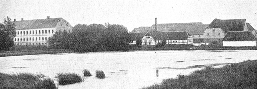 Scheelenborg er en gammel hovedgård, som nævnes første gang i 1280, gården blev kaldt Eskebjærg fra 1280 til 1680, kaldt Scheelenborg fra 1680. Gården ligger i Stubberup Sogn, Bjerge Herred, Kerteminde Kommune. Hovedbygningen er opført i 1843.